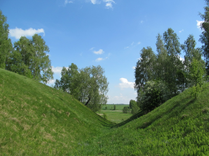 Старая Мыш. Валы замка Хадкевіча